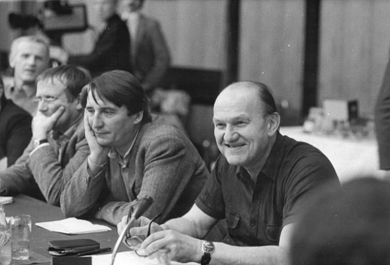 ADN-ZB Senft 29.12.81 Berlin: An der "Berliner Begegnung zur Friedensförderung" von Schriftstellern, Künstlern und Wissenschaftlern aus europäischen Ländern vom 13. bis 14. Dezember 1981 nahm Franz Fühmann (r.) teil.